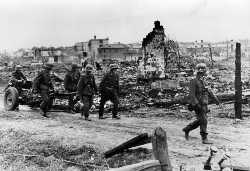 Russland, Kampf um Stalingrad, Infanterie Infanterie wird nach vorn gezogen Infanterie im Ringen um Stalingrad. Ein leichtes Infanterie-Geschütz wird nach vorn in eine neue Stellung gezogen, um feindliche Stützpunkte unter ein erfolgreiches Feuer zu nehmen. PK-Aufnahme: Kriegsberichter Herber 12.10.42 [Herausgabedatum] [Sowjetunion.- Schlacht um Stalingrad]